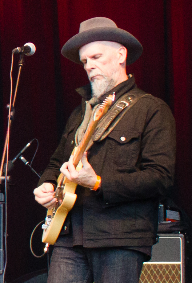 Jimmy Rip en vivo (2014)